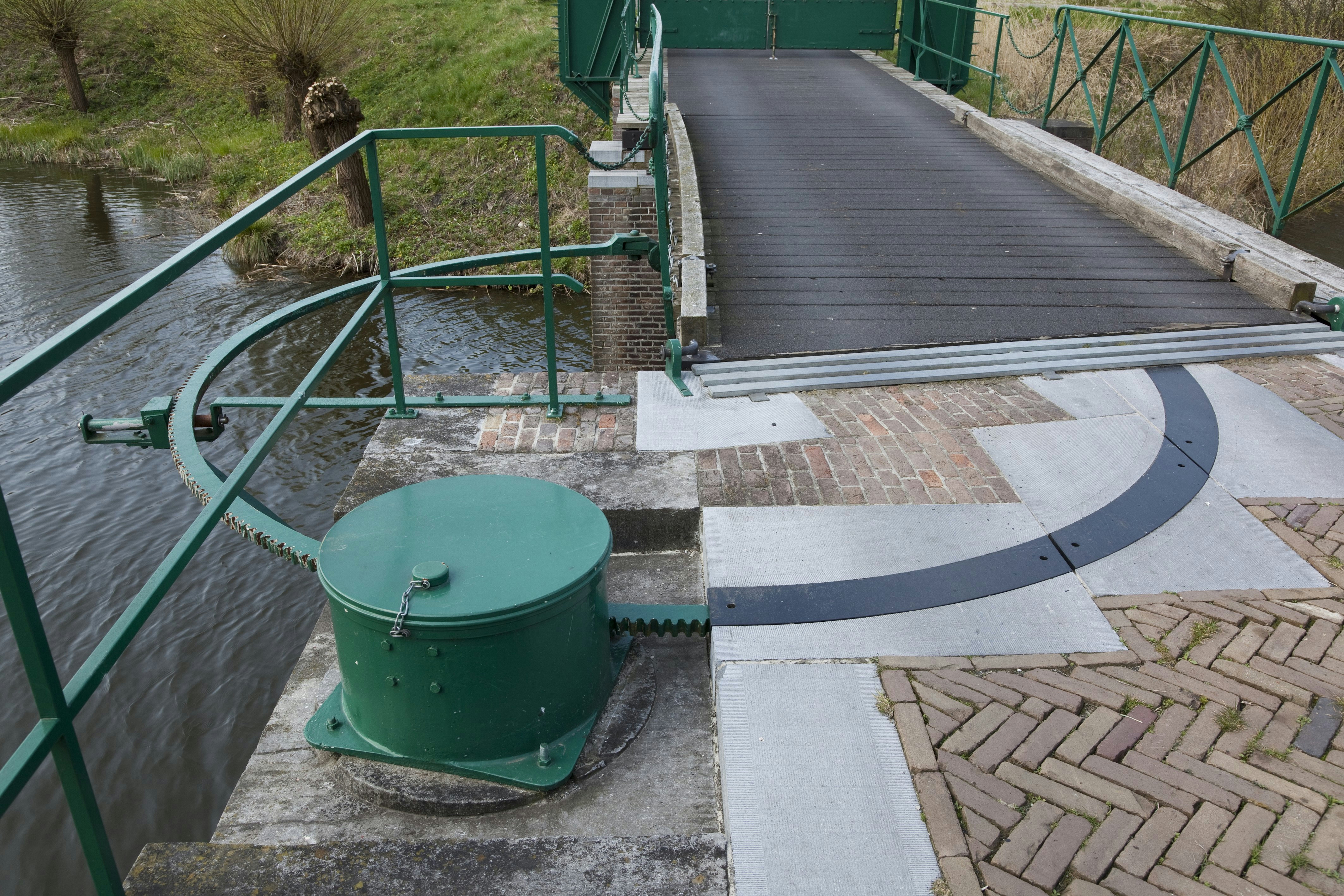 Fort Ronduit: Fort Ronduit (opmerking: Nieuwe Hollandse Waterlinie / Cluster 07)